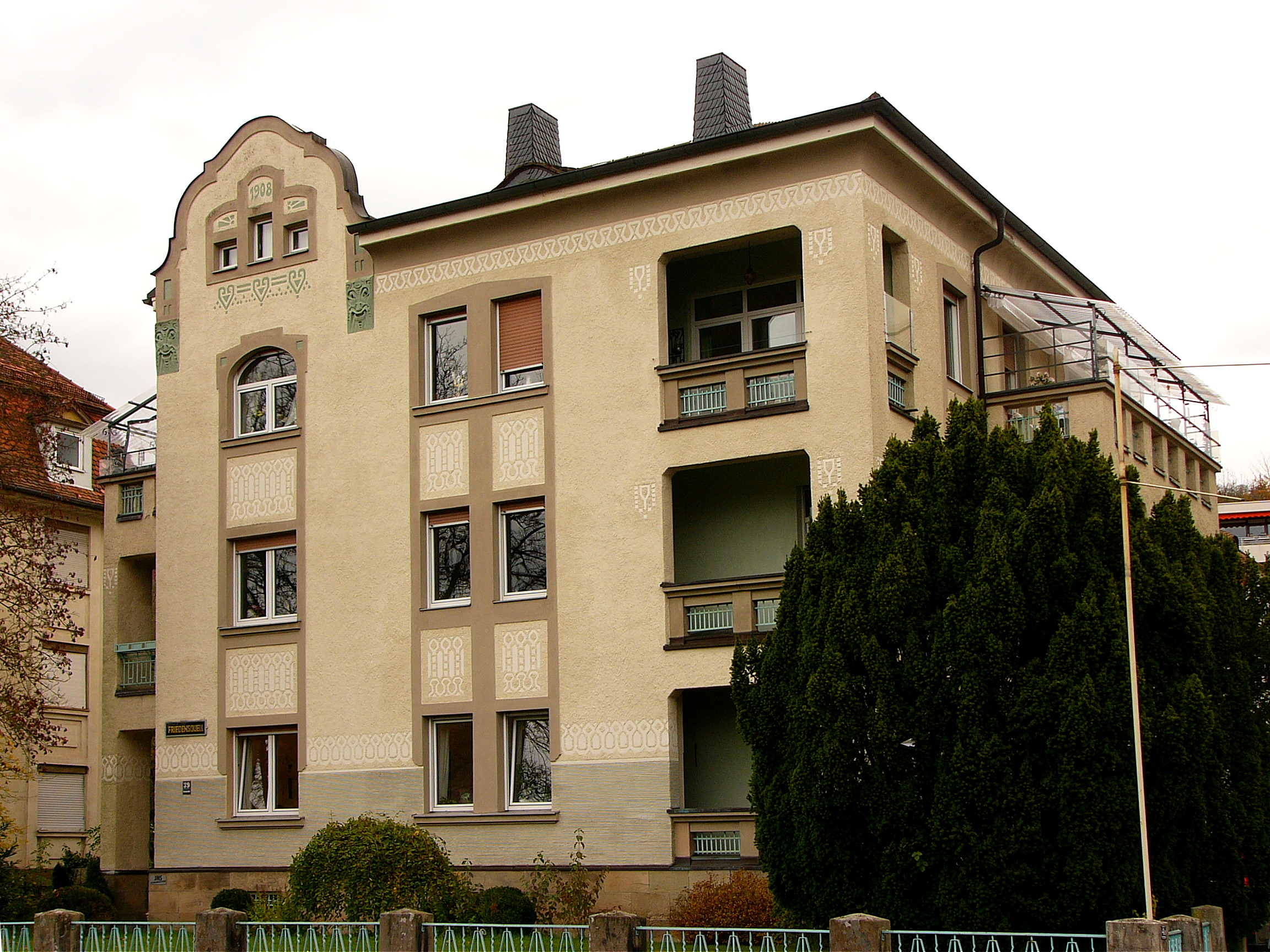 Ehemals Kurheim; dreigeschossiger Massivbau mit flachem Walmdach, Ziergiebeln, Balkonen und Putzdekor, in Formen des Jugendstils, von Joseph Dölger, bezeichnet 1908. This is a photograph of an architectural monument.